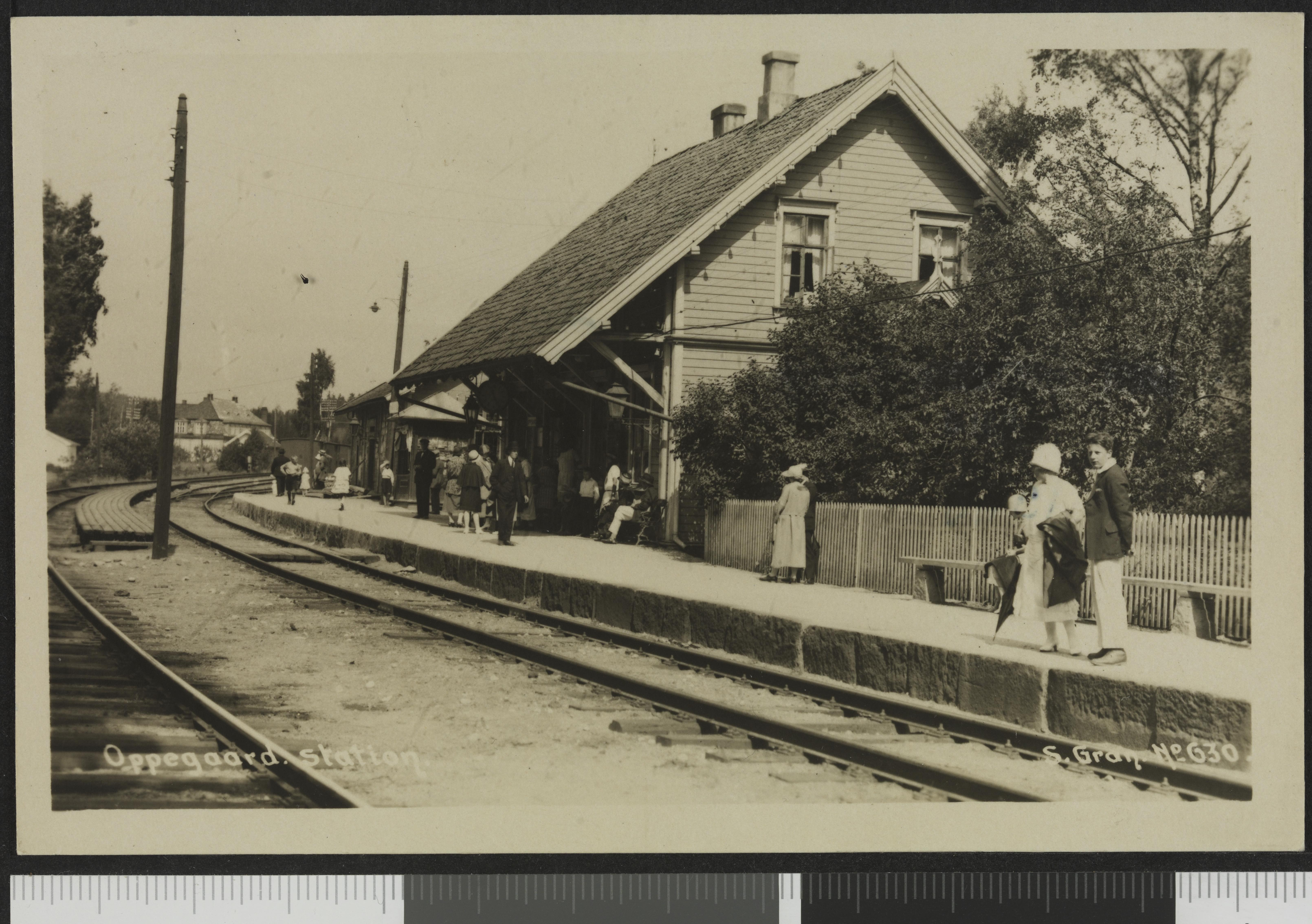 Bildet er hentet fra Nasjonalbibliotekets bildesamling Oppegård stasjon, Oppegård, Akershus